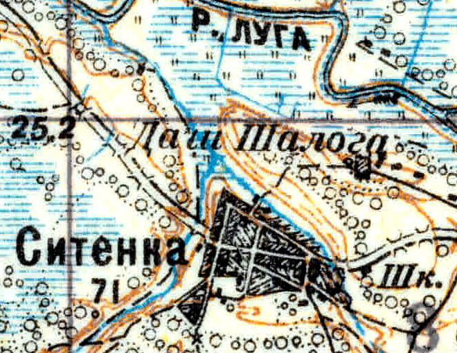 Топографическая карта Ленинградской области, квадрат VIc (Красные Горы), деревня Ситенка